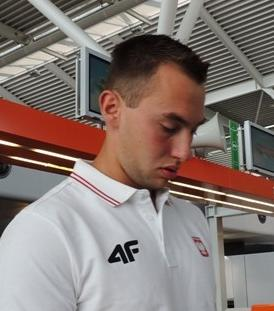 Marcin Krukowski - polski oszczepnik, wicemistrz Europy juniorów z 2011